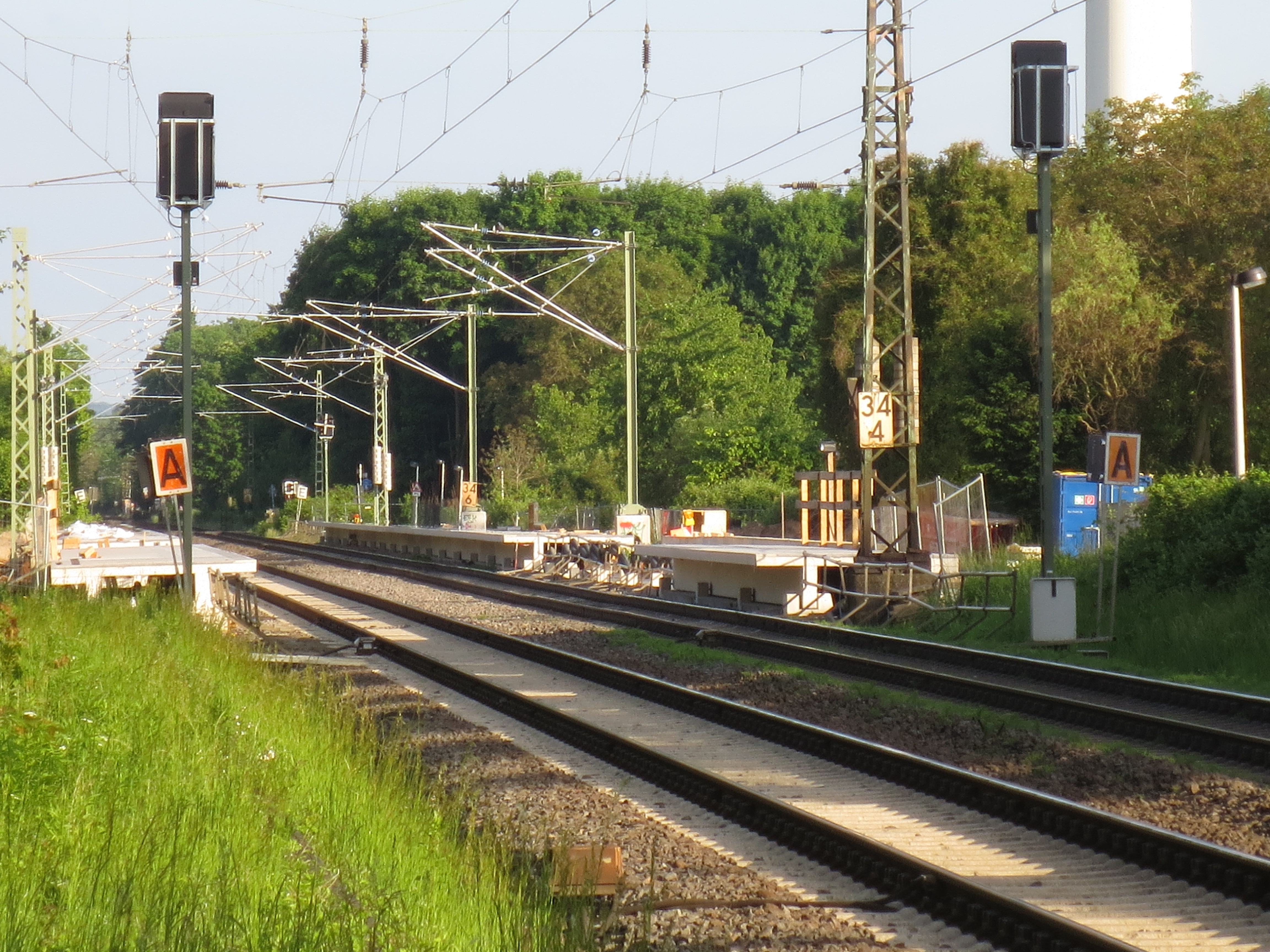 Fast fertige Bahnsteige vom Haltepunkt Bonn UN Campus. Fotographiert vom Bahnübergang Gronau/Kessenich.